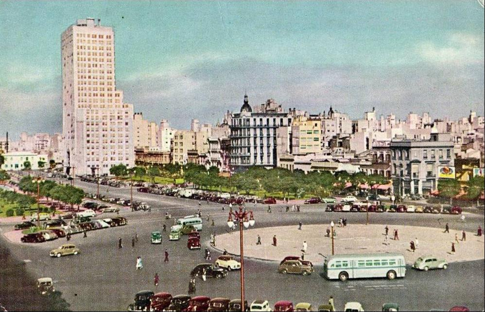 Vista de la Avenida 9 de Julio en su extensión hasta la Avenida Belgrano, cerca de 1950. Se ve en primer plano la rotonda que existía en el cruce con la Avenida de Mayo.